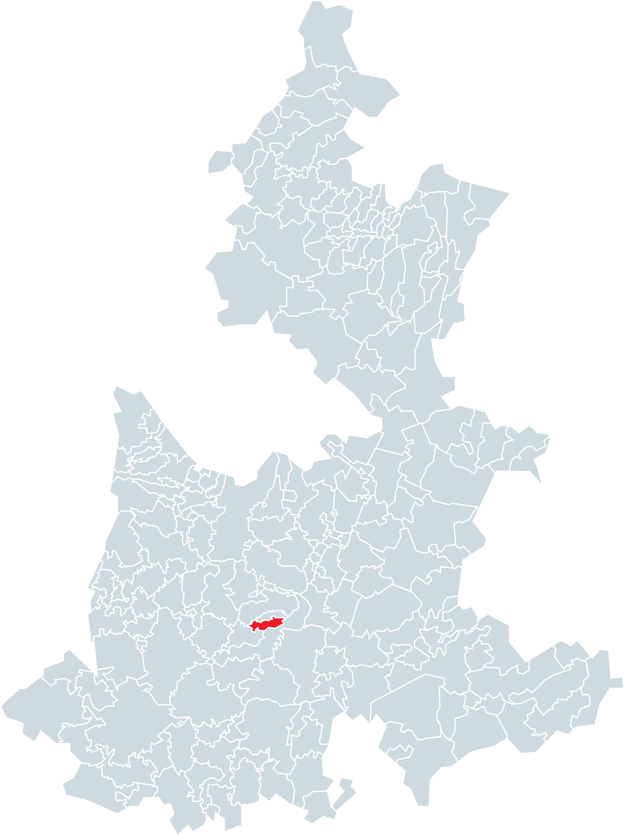 Municipio de Santa Catarina Tlaltempan